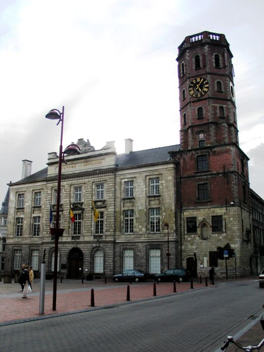 Stadhuis en belfort van Menen - eigen foto